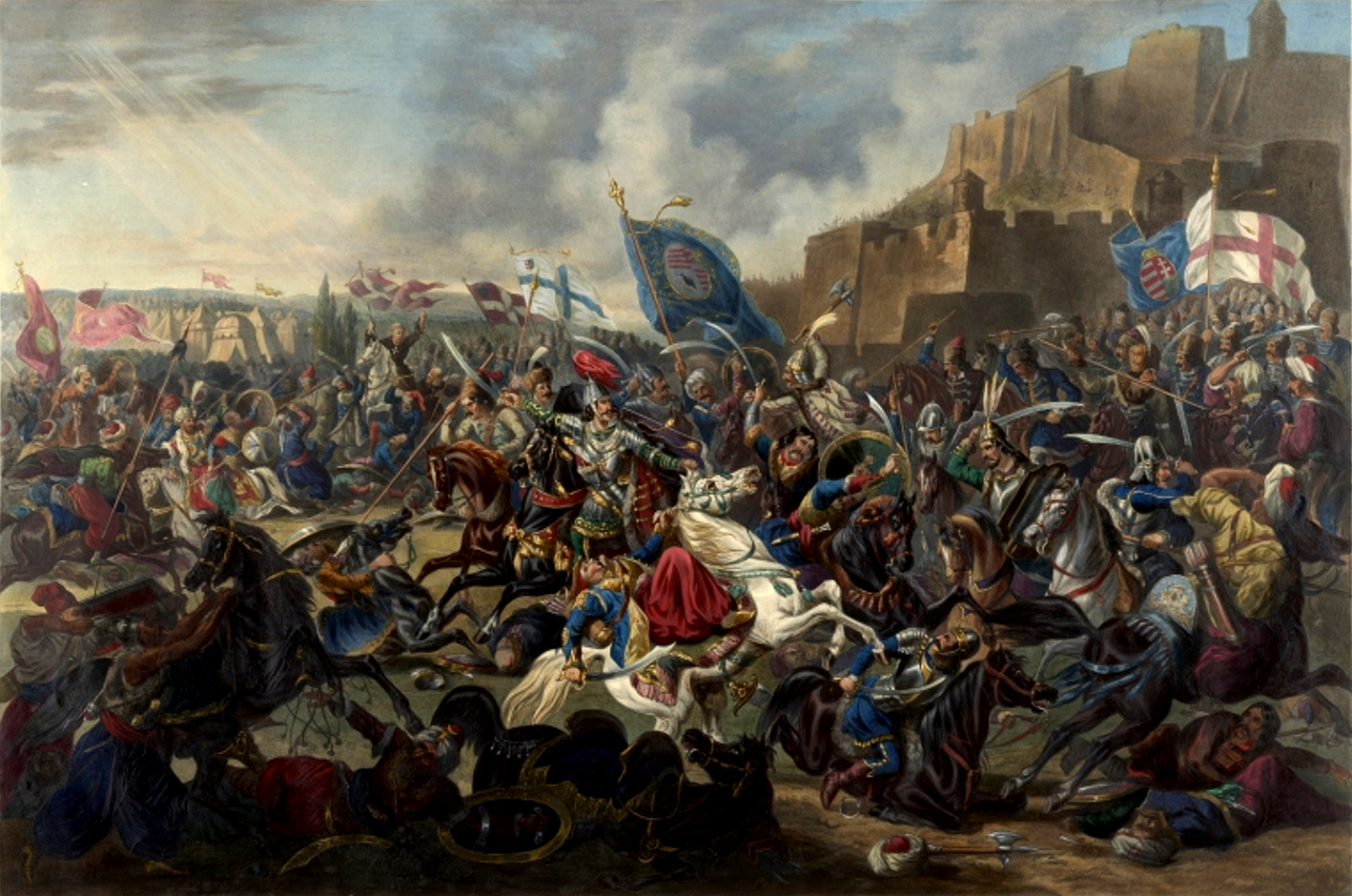 Belagerung der ungarischen Stadt Belgrad (altungarisch: Nándorfehérvár), durch die Osmanen. Sie wird erfolgreich von Johann Hunyadi verteidigt, unterstützt durch den Franziskanerpater Johannes Capistranus, der so erfolgreich predigte, dass die Armee um kriegsbegeisterte Bauern vertärkt werden konnte. Kolorierter Stahlstich von Anton Bogner, Prägewappen von Ungarn unter der Darstellung. Nicht mehr lesbare geprägte Inschriften.